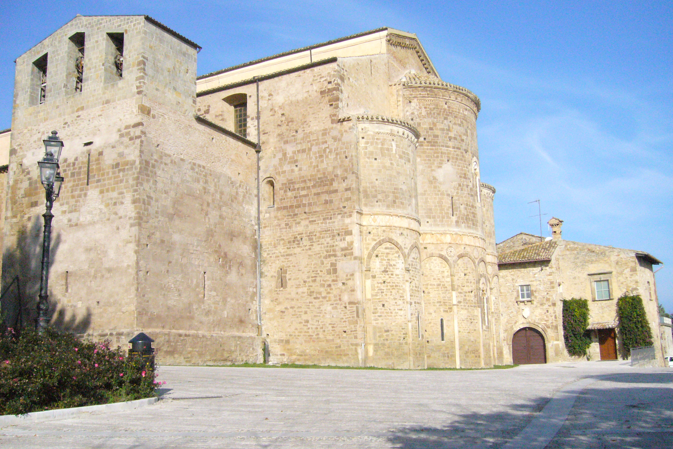 Abbazia di San Giovanni in Venere